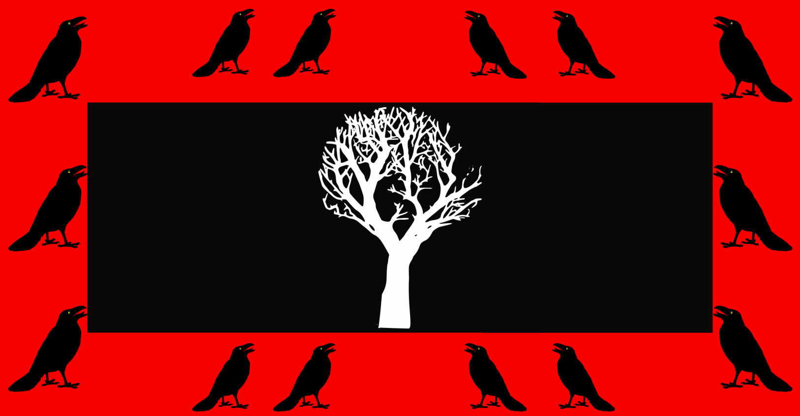 House Blackwood-Game of Thrones Flag